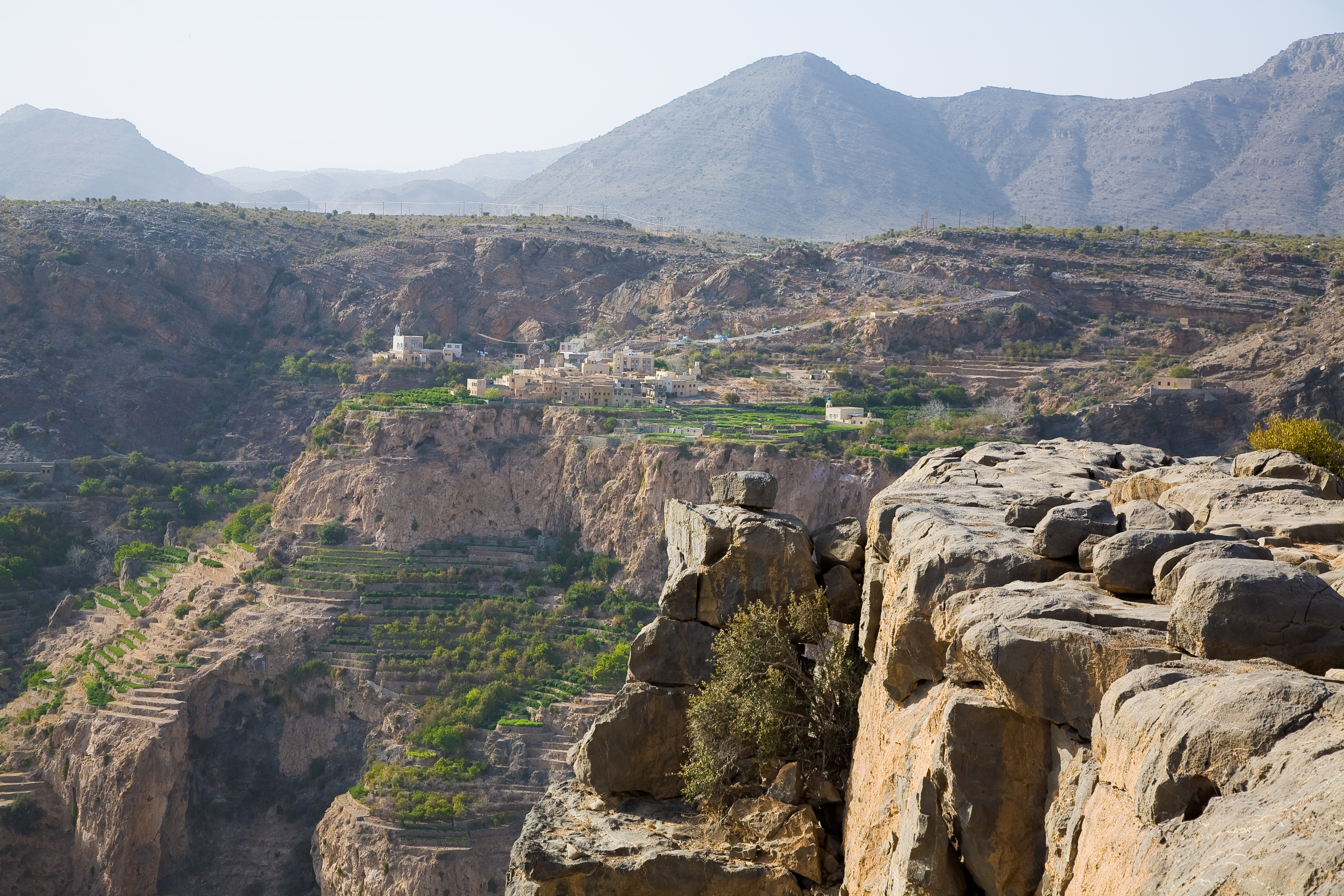 Jebel Akhdar, Oman